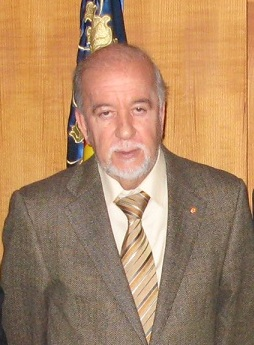 El 4 de febrero de 2015 miembros de la directiva de AELPA se reúnen con el alcalde de Alicante, Miguel Valor, y los concejales Carlos Castillo y Andrés Llorens, este último responsable del área de Servicios, para abordar la nueva licitación del contrato de limpieza de centros educativos y depedencias municipales de Alicante.